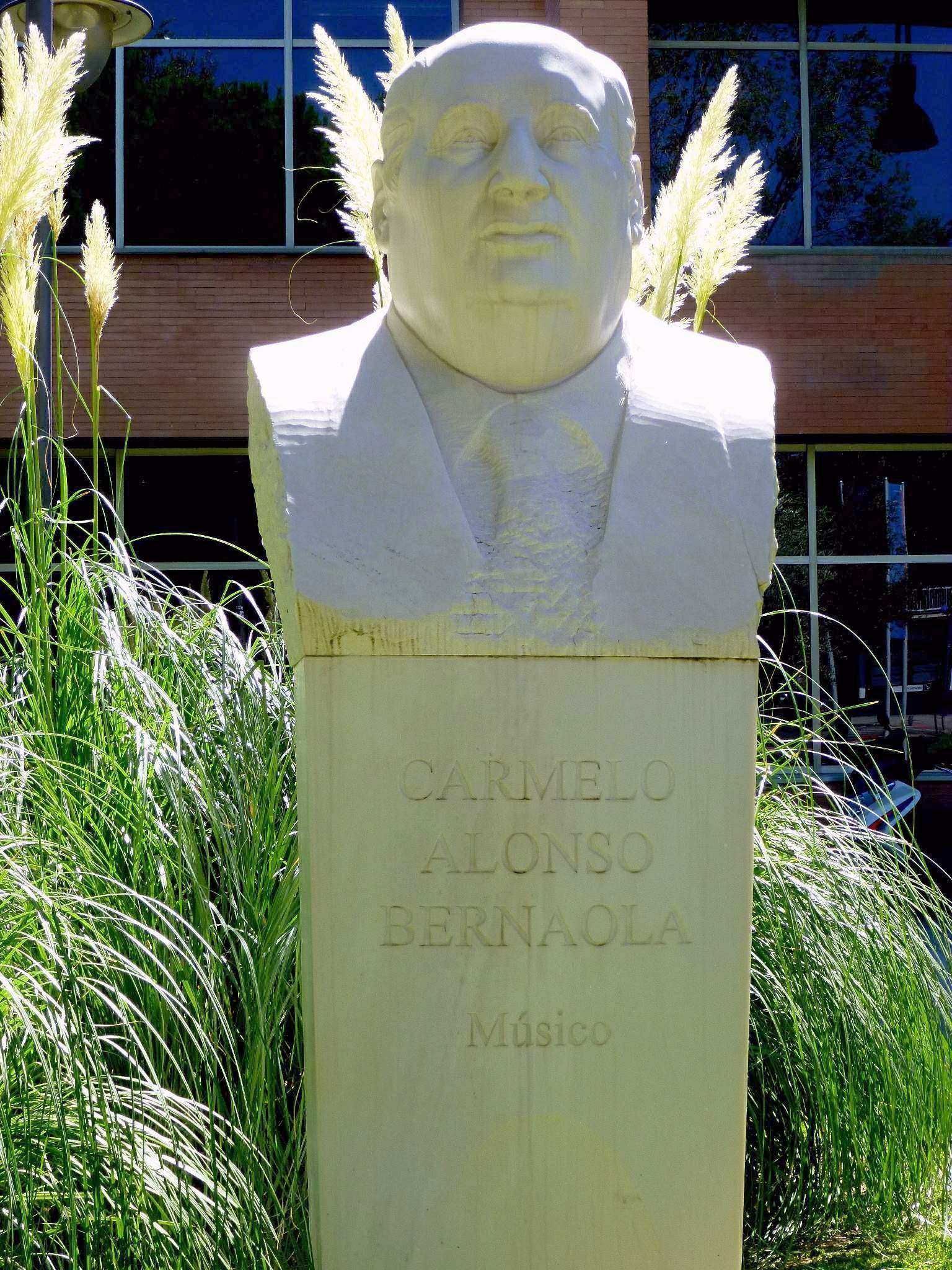 Leganés - Monumento a Carmelo Bernaola